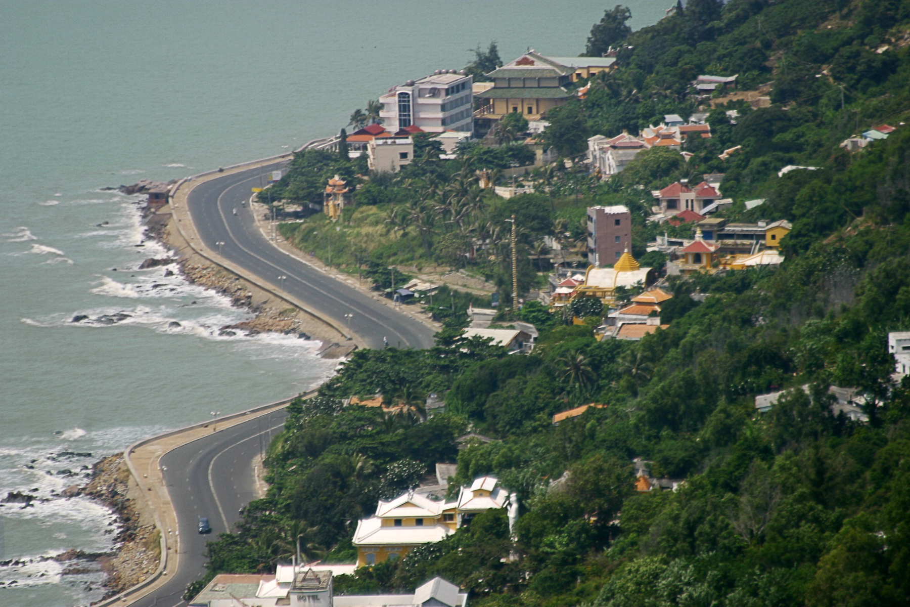 Ha Long Road in Vung Tau, Vietnam